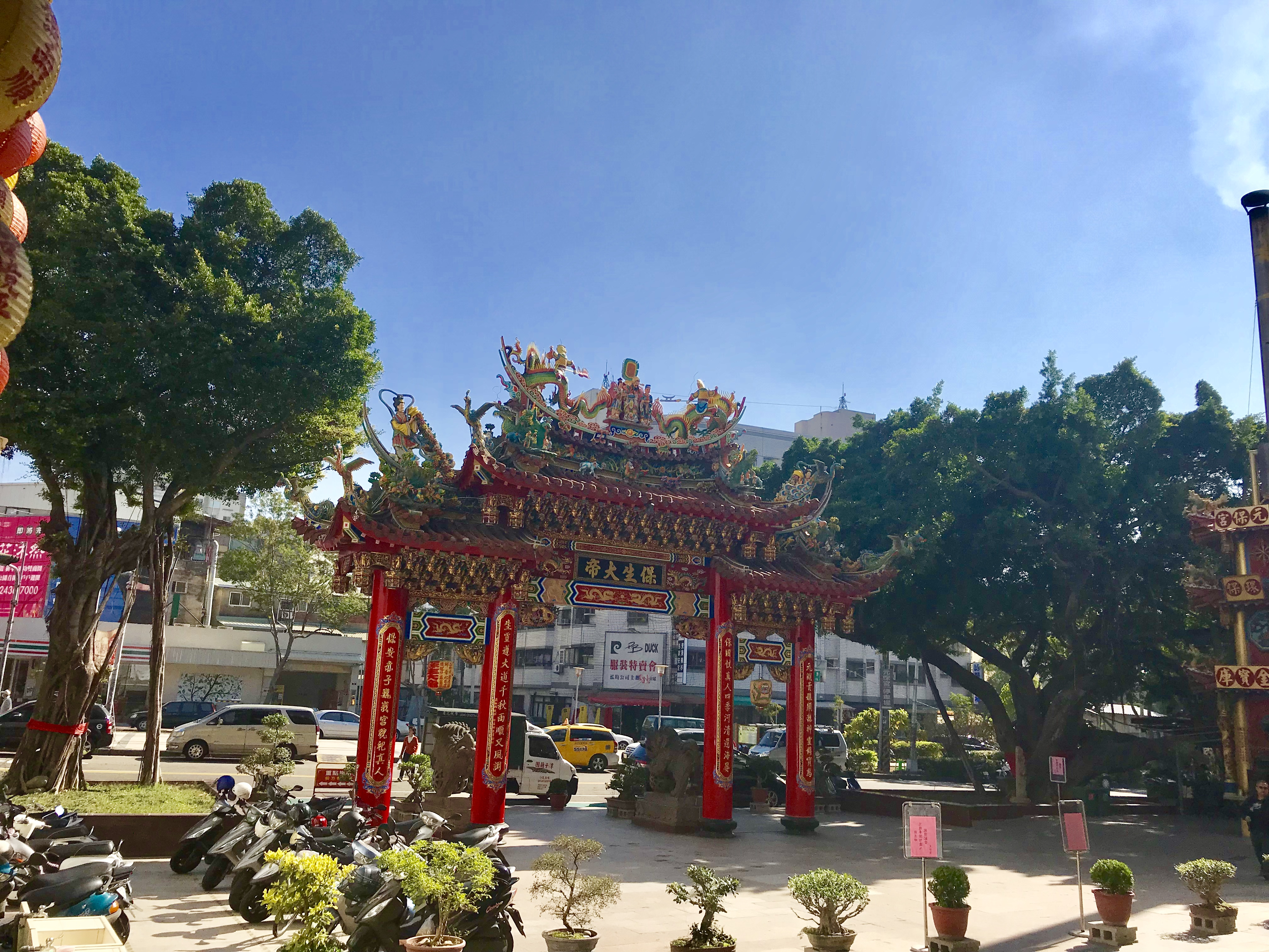 元保宮牌樓與老榕樹